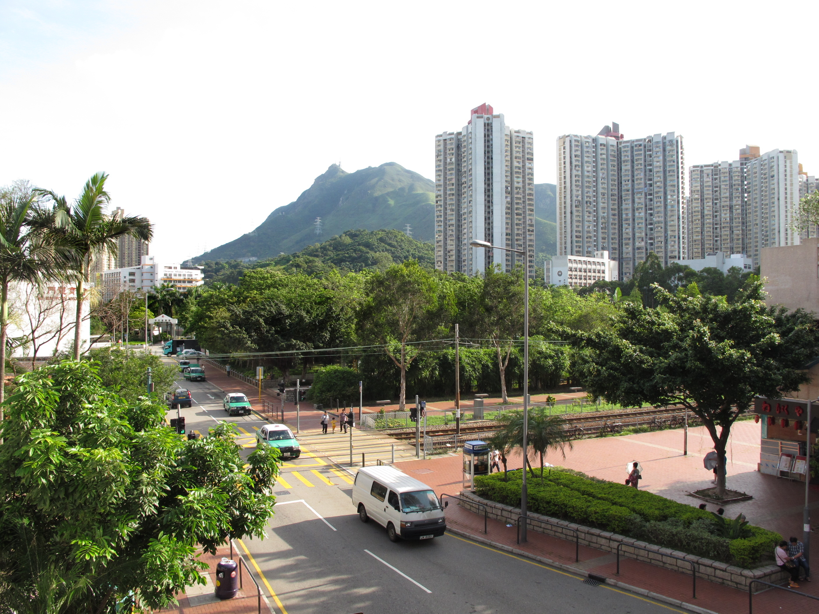 Tuen Mun Tsing Tin